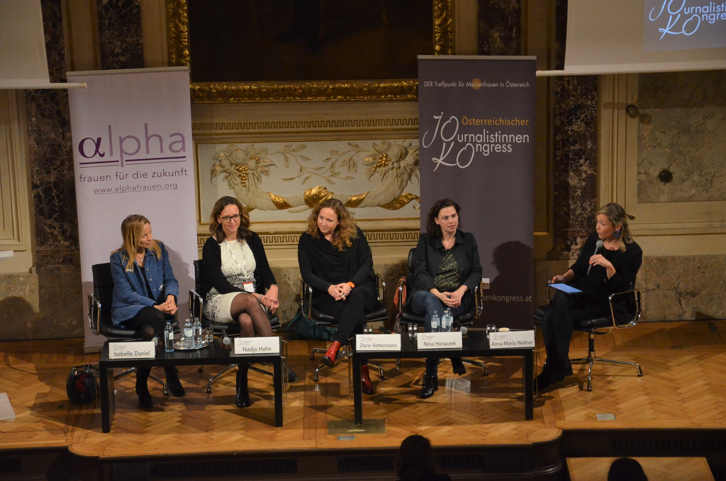 Österreichischer Journalistinnenkongress 2017, Foto: Lisa Lugerbauer